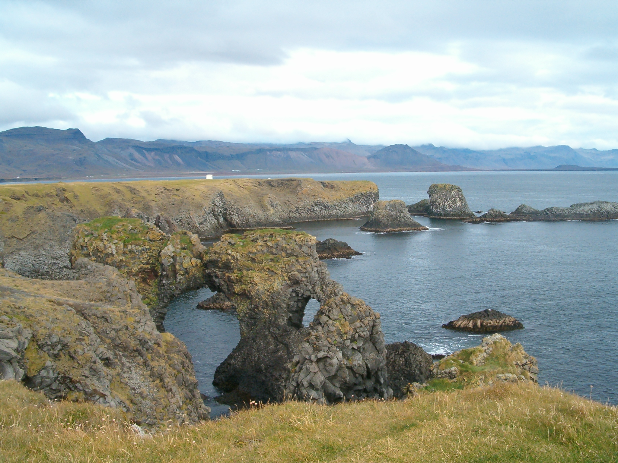 Gatklettur.